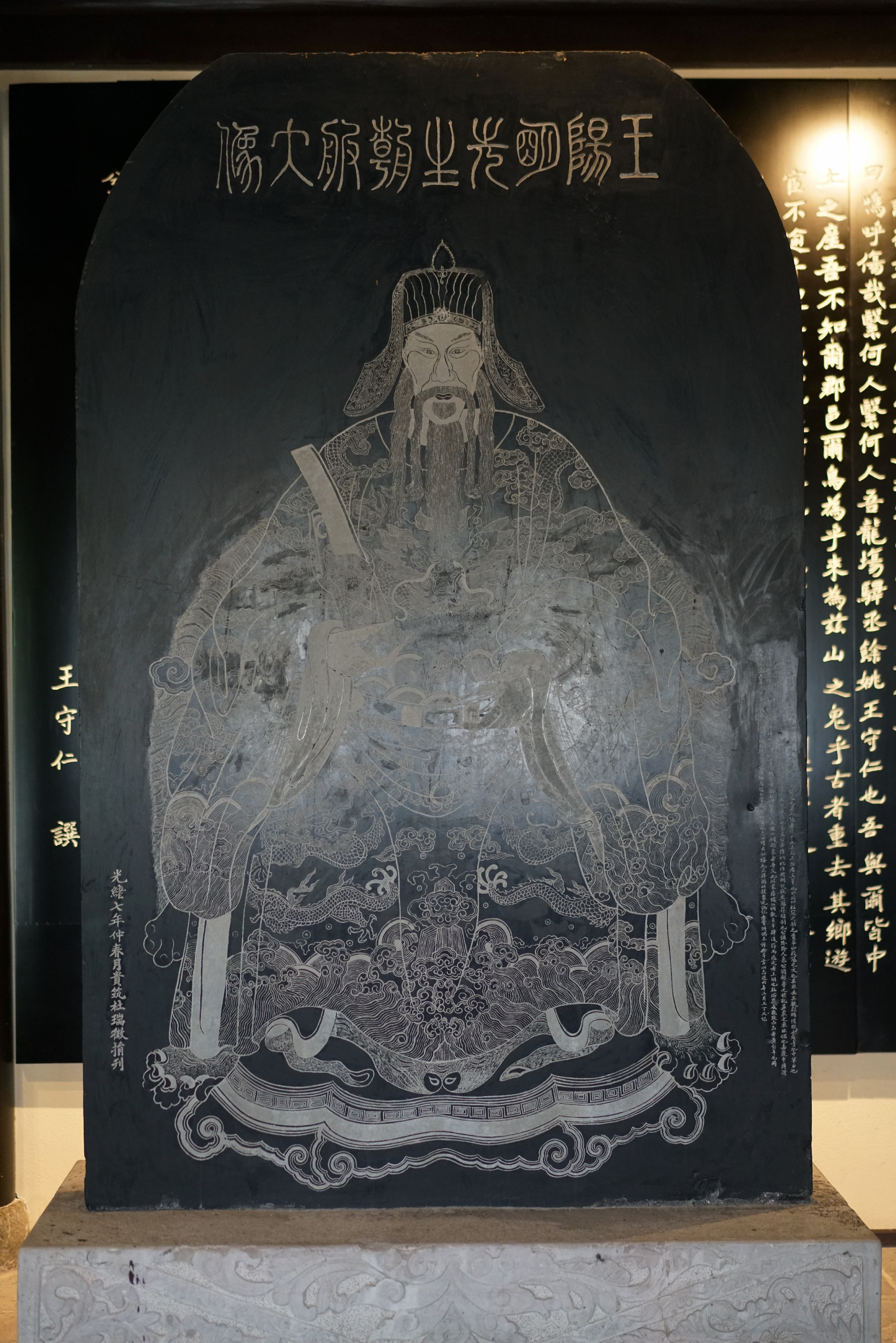 中文（中国大陆）: 享堂内的王阳明像